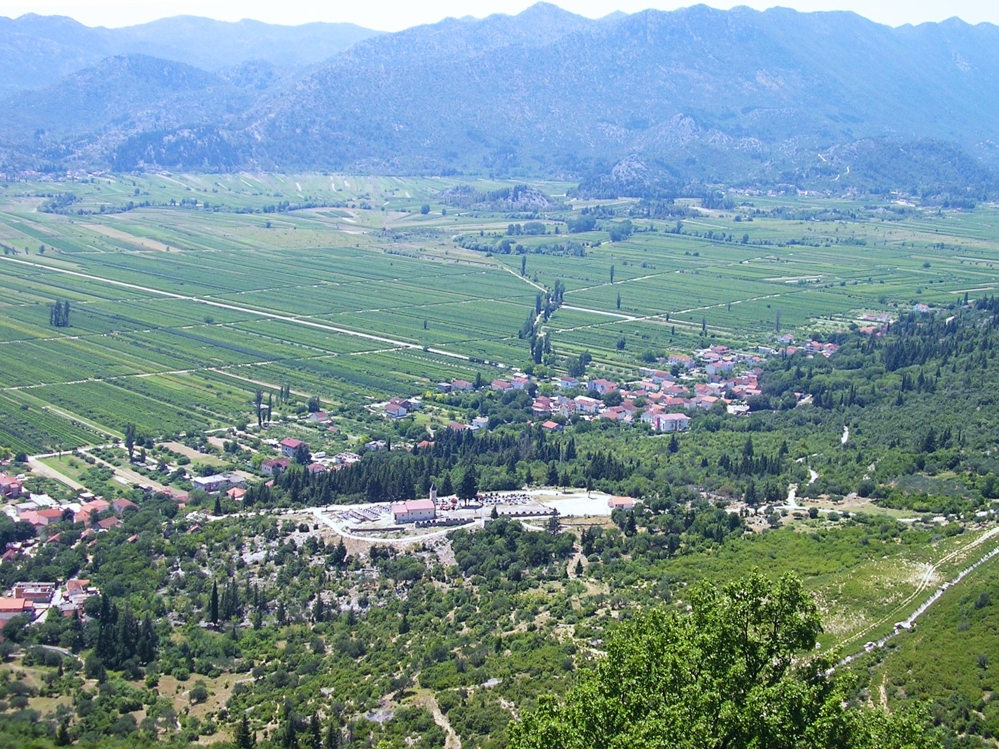 Otrić-Seoci